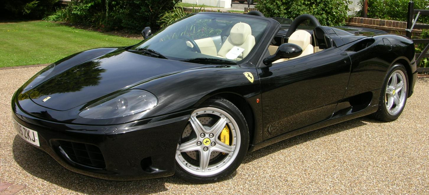 2005 Ferrari 360 Spider F1